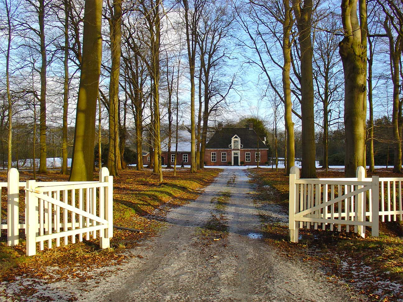 Huis te Westervelde of Tonckensborg te Westervelde nabij Norg